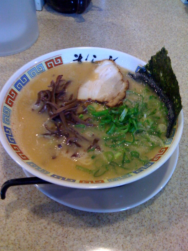 九州大牟田ラーメン:きらら